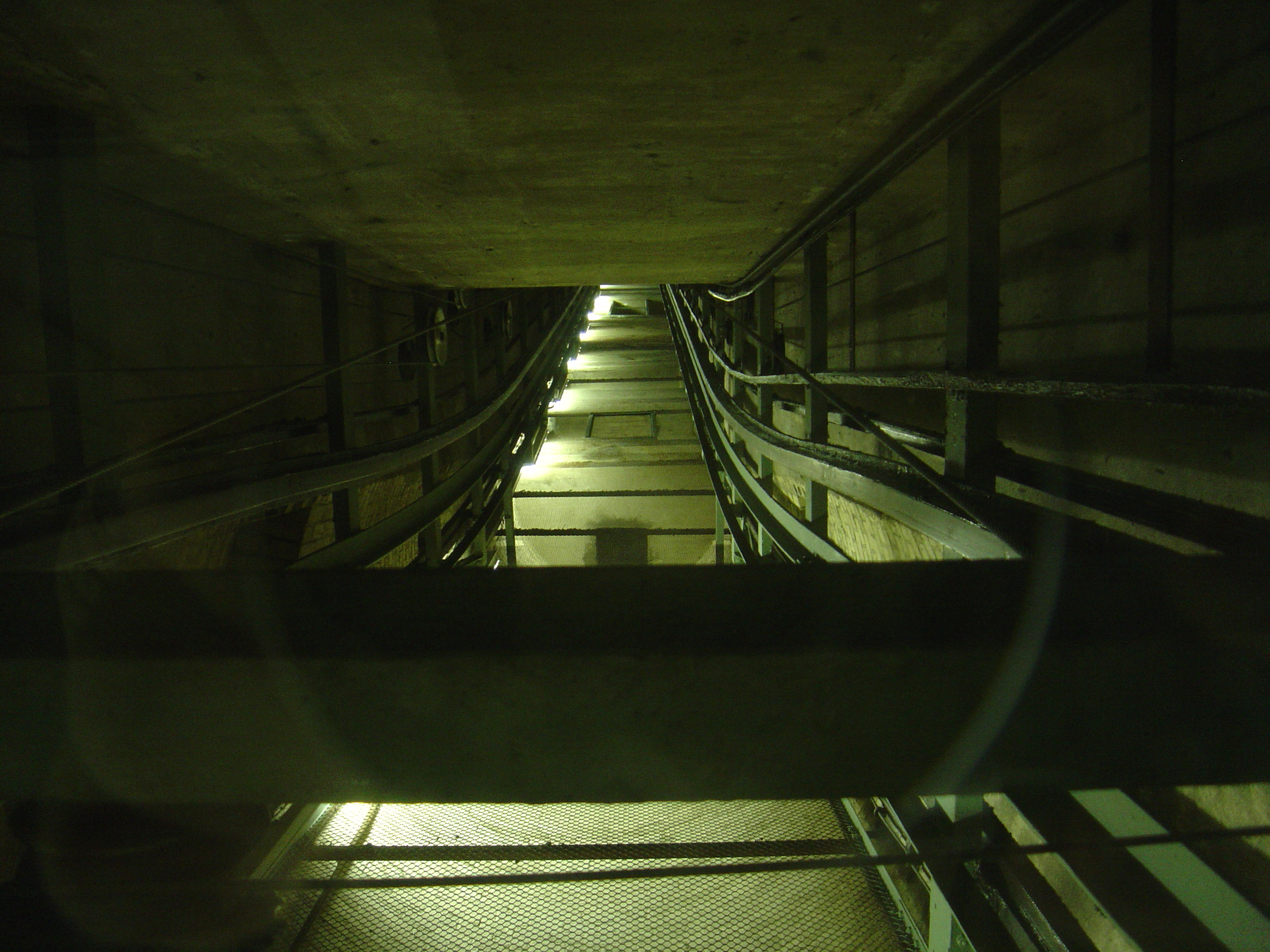 Der Schacht des Schrägaufzuges im Neuen Rathaus von Hannover.